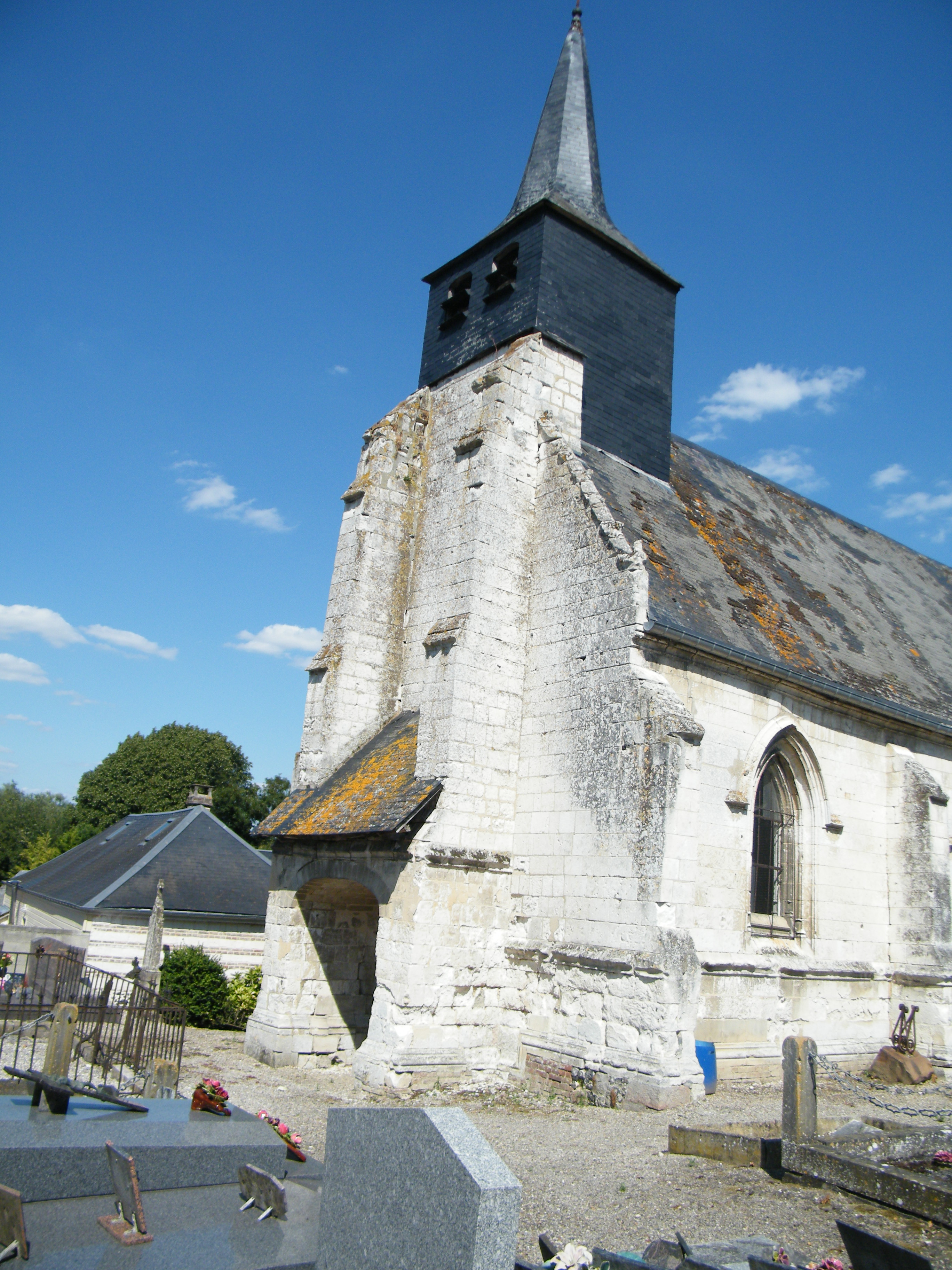 Fontaine (Somme), Vieulaines, église